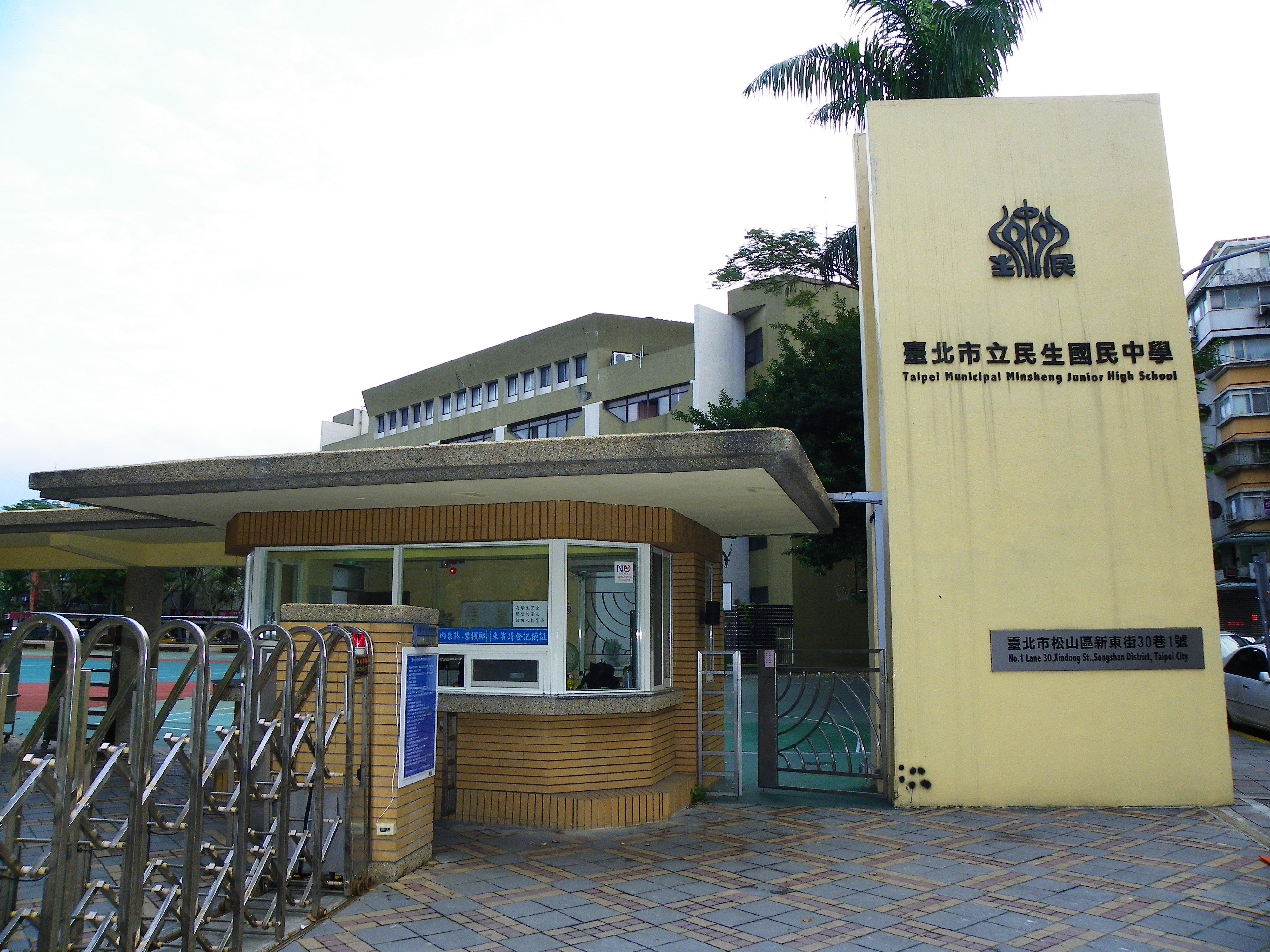 台北市立民生国民中学の正門。